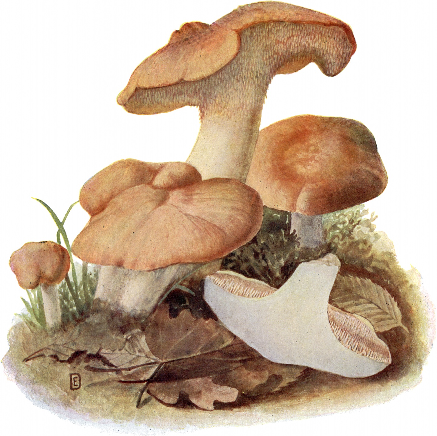 Stoppelpilz, Hydnum repandum. Eßbar.